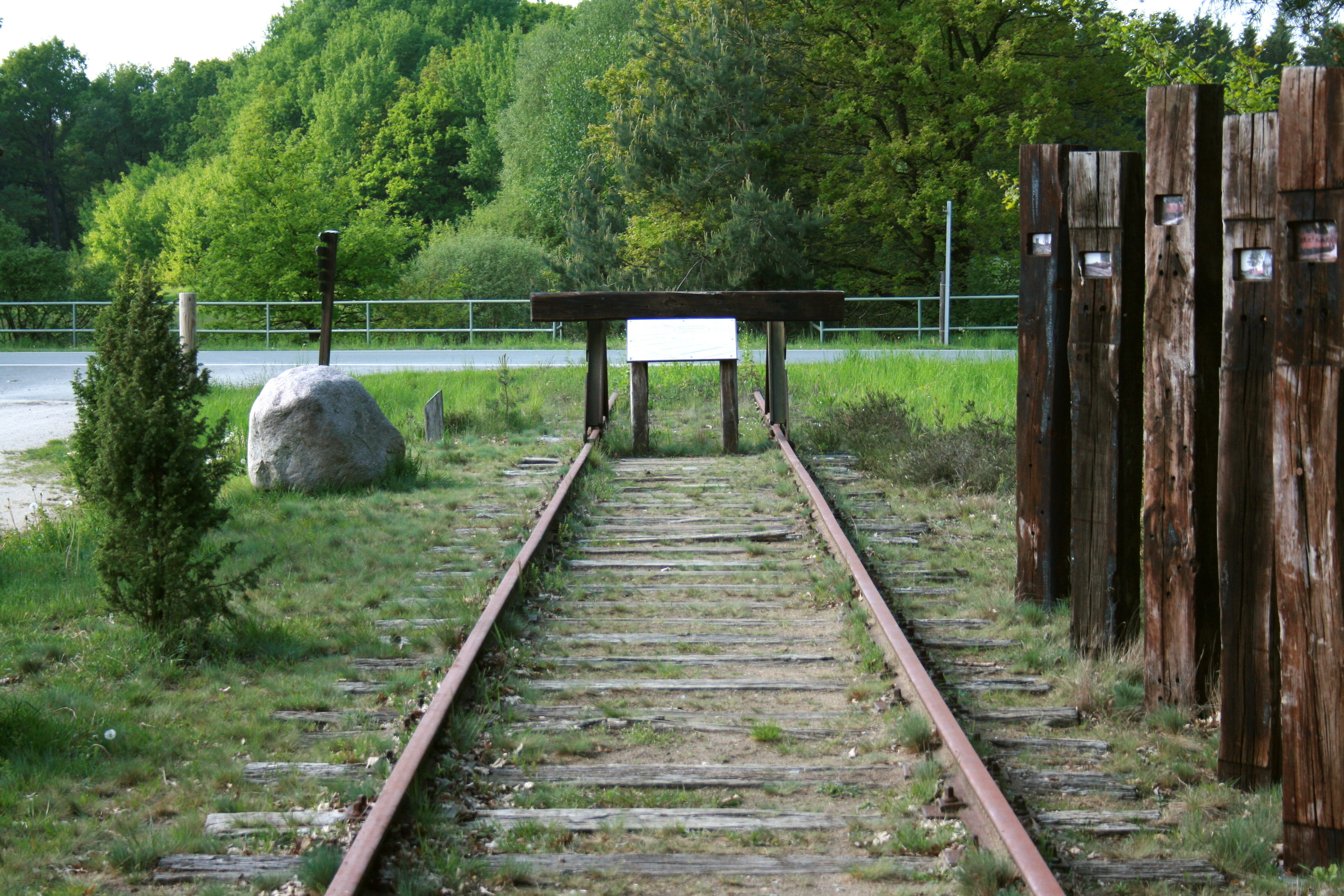 Denkmal für die ehemalige Eisenbahnlinie Soltau-Neuenkirchen an der Soltauer Straße in Neuenkirchen (Lüneburger Heide)